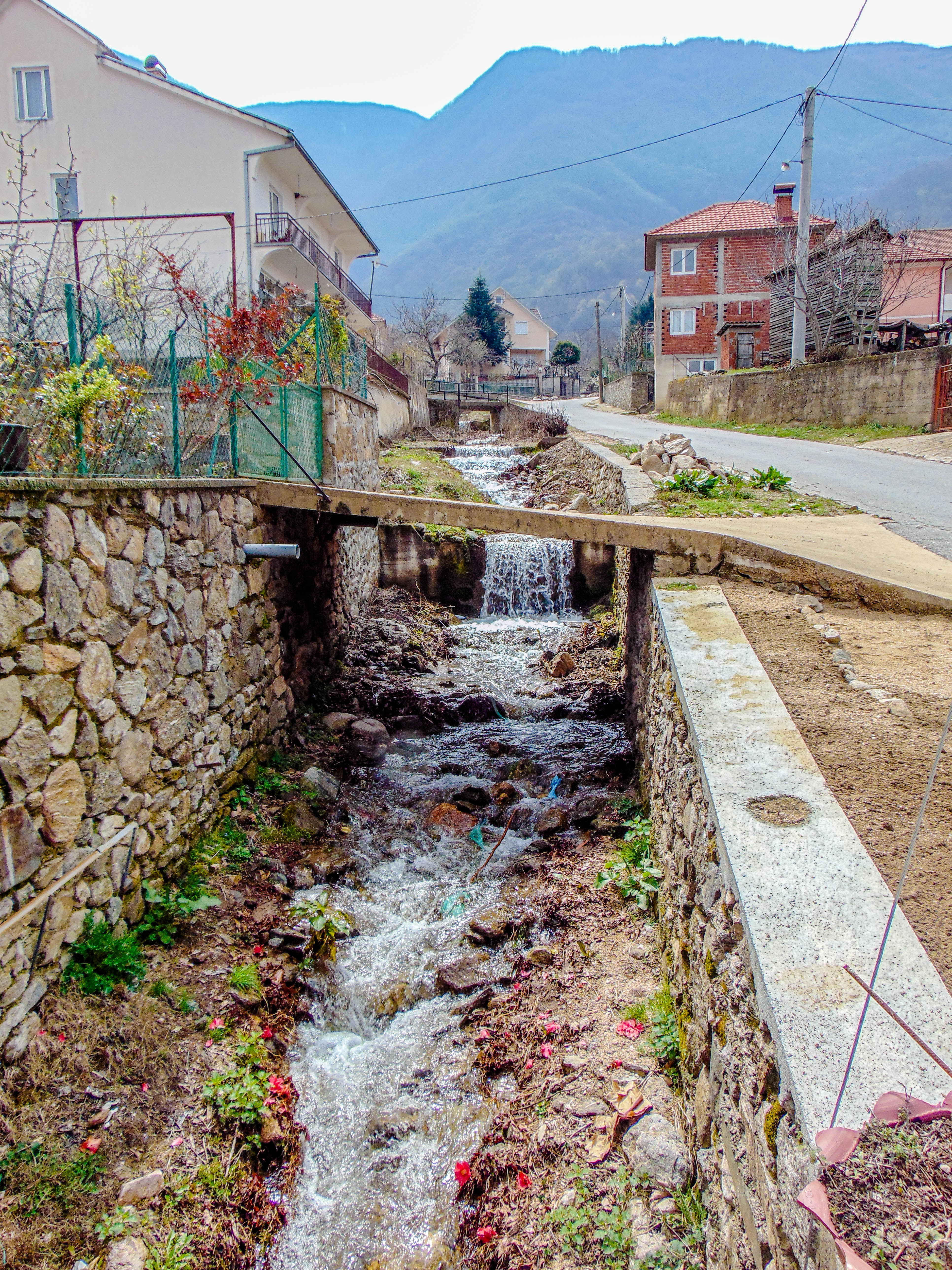 Старо Коњарево